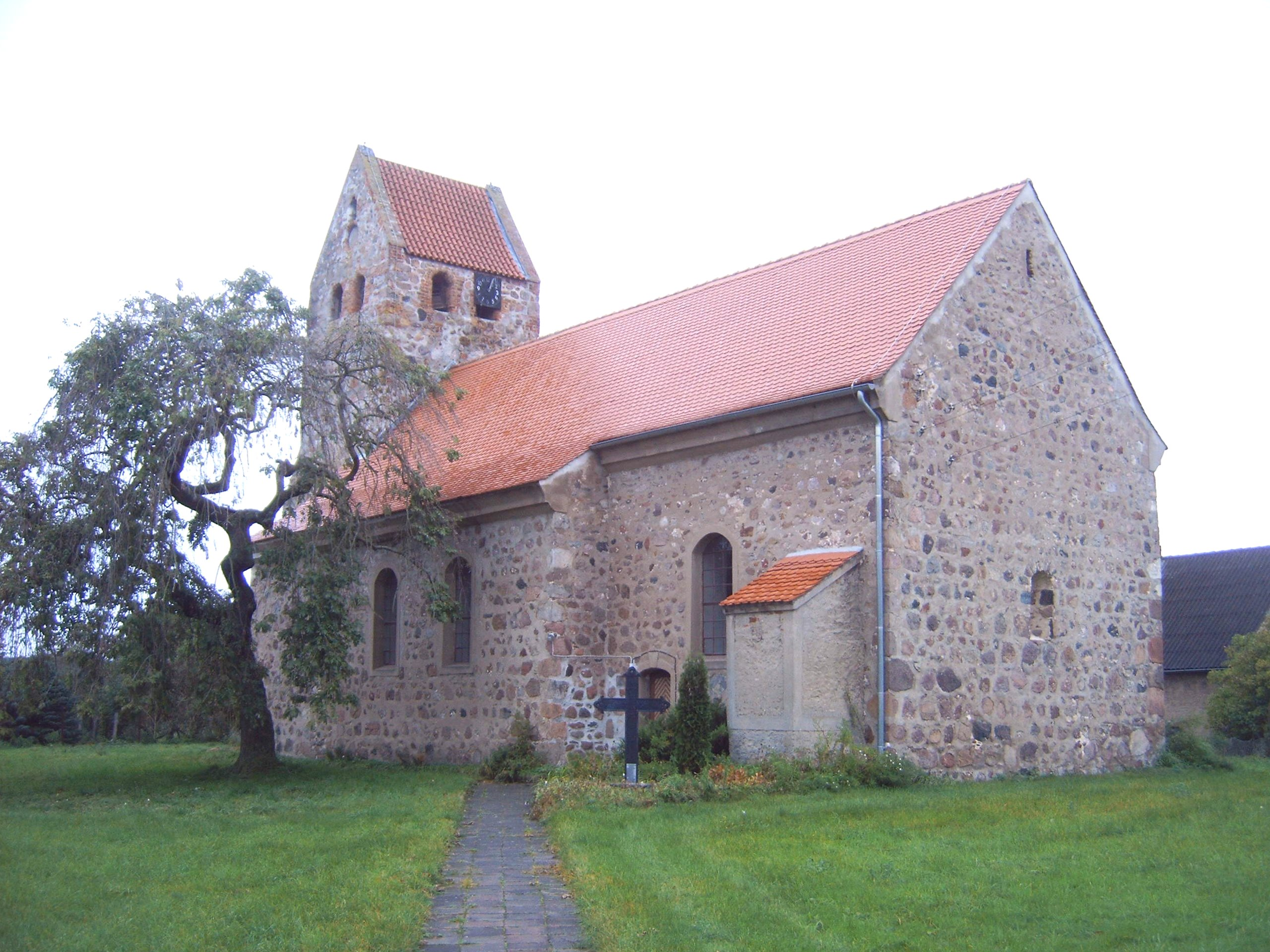 Dorfkirche Schwiesau, Altmark, Sachsen-Anhalt, Deutschland